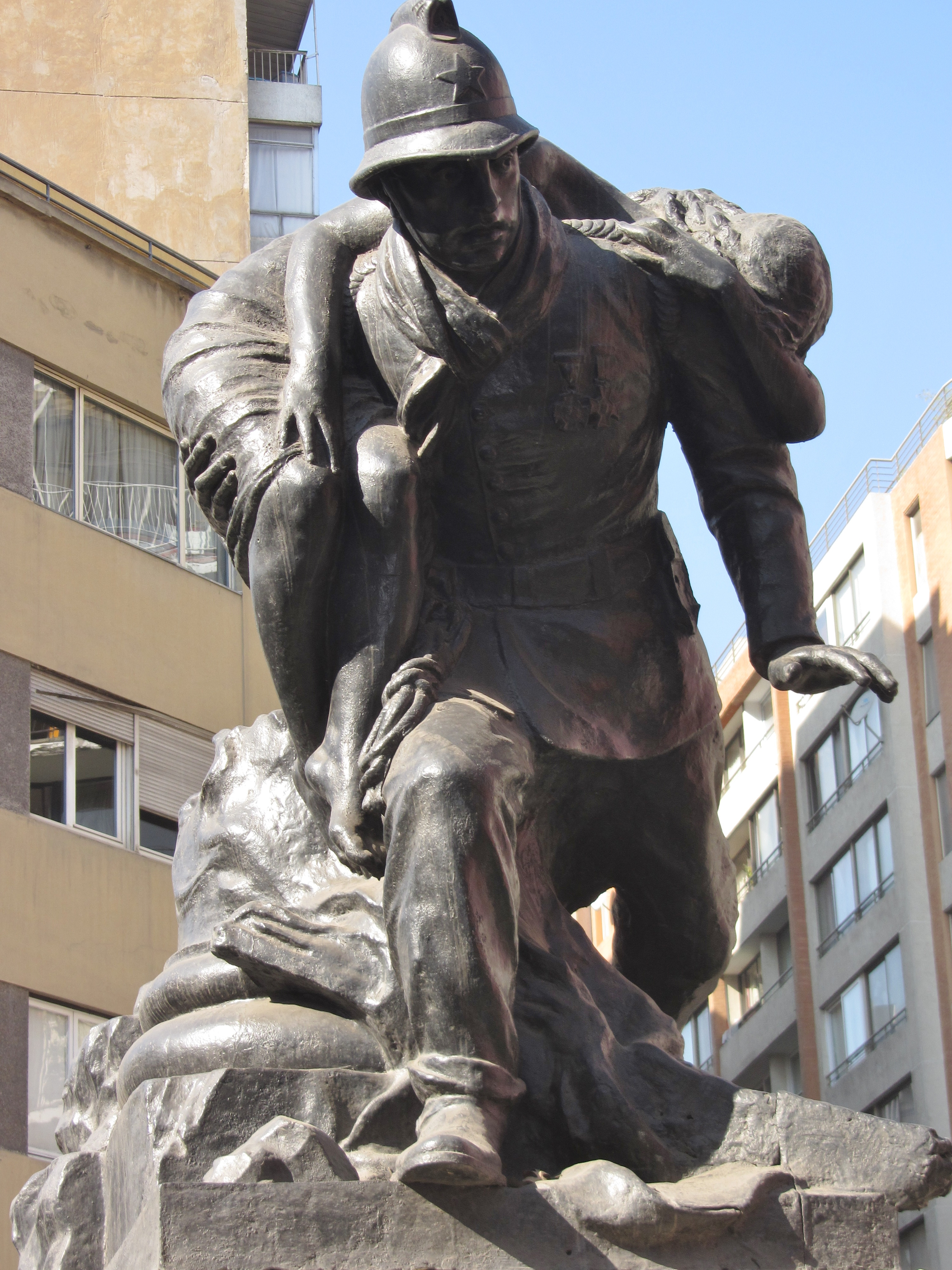 El conjunto escultórico está ubicado a un costado del Museo de Arte Contemporáneo (MAC), casi a la salida de calle Mosqueto sobre la placita triangular de calle Ismael Valdés Vergara, allí donde se abren las calles Esmeralda y Santo Domingo, en Santiago de Chile.